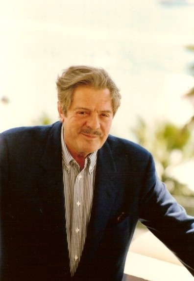 Marcello Mastroianni au festival de Cannes